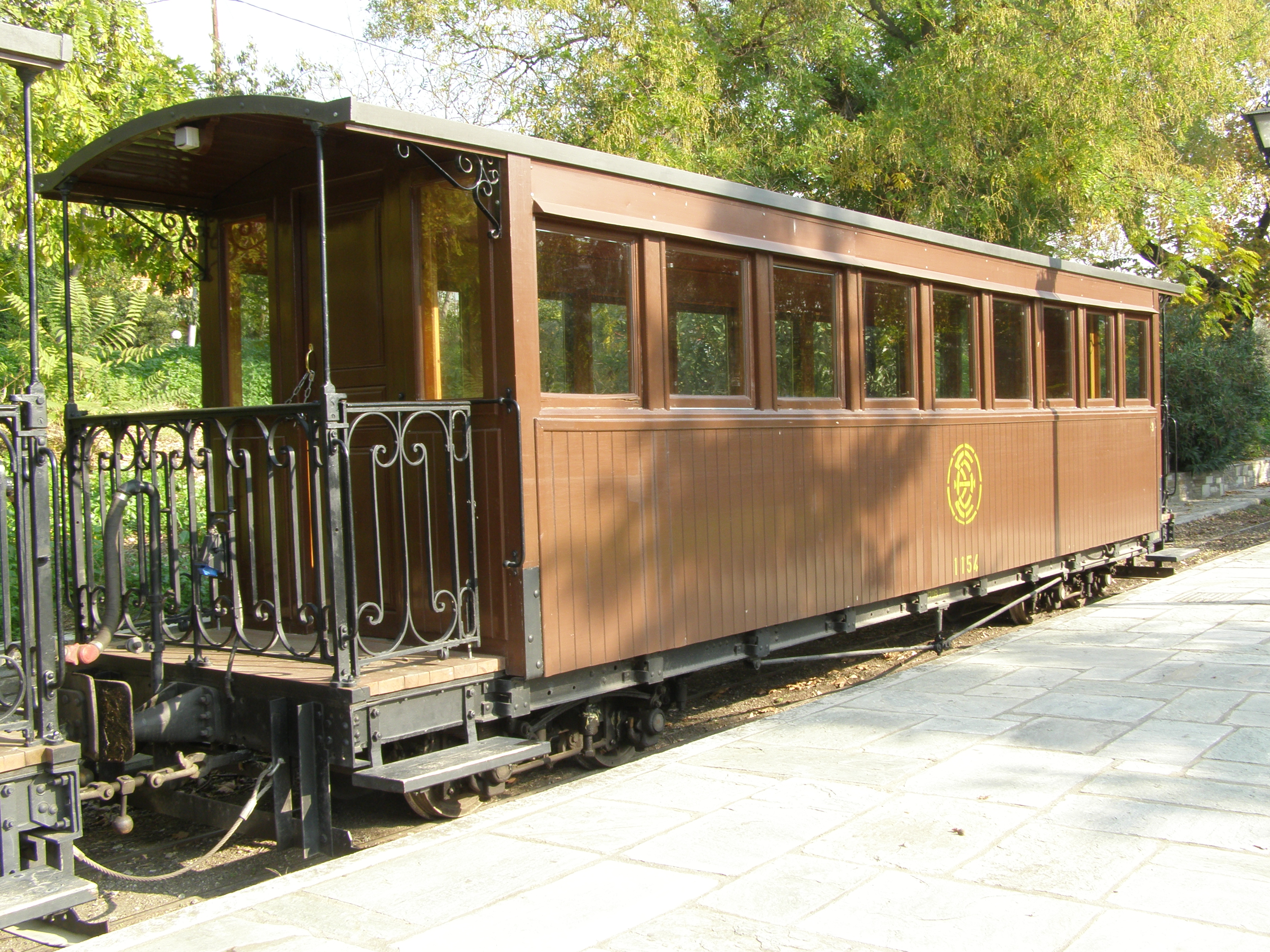 Pelion railway